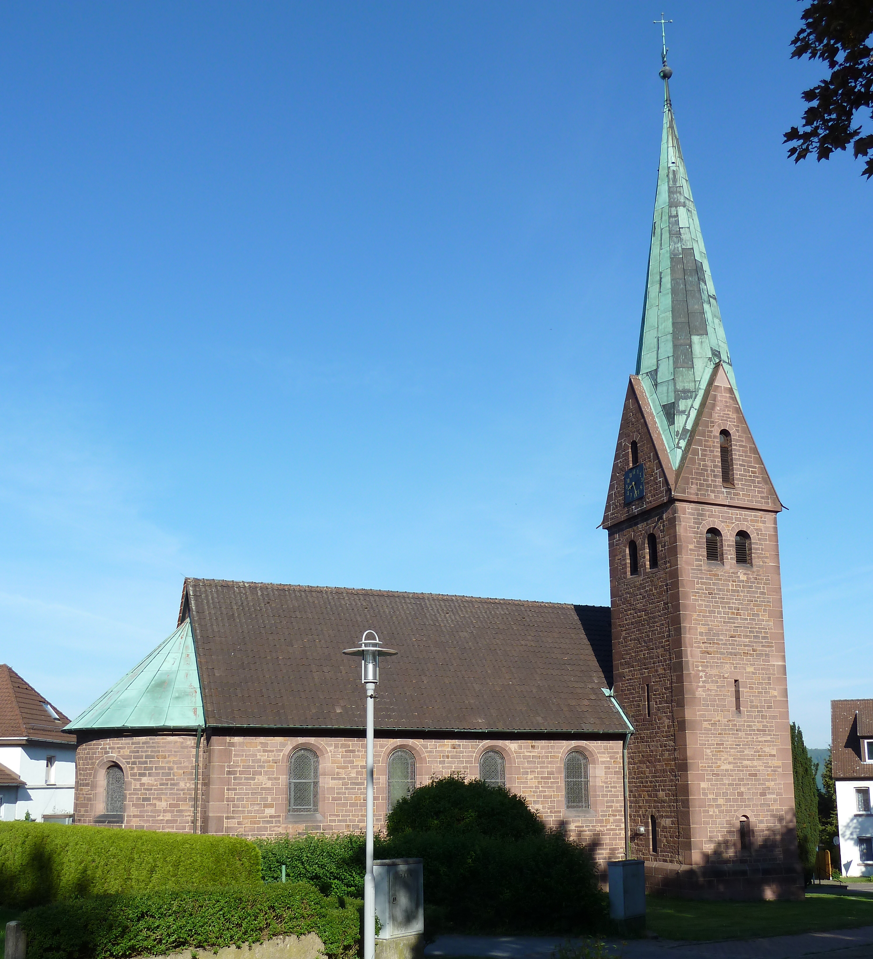 Ev.-luth. Christuskirche in Fürstenberg an der Weser, Landkreis Holzminden, Niedersachsen. Erbaut 1899